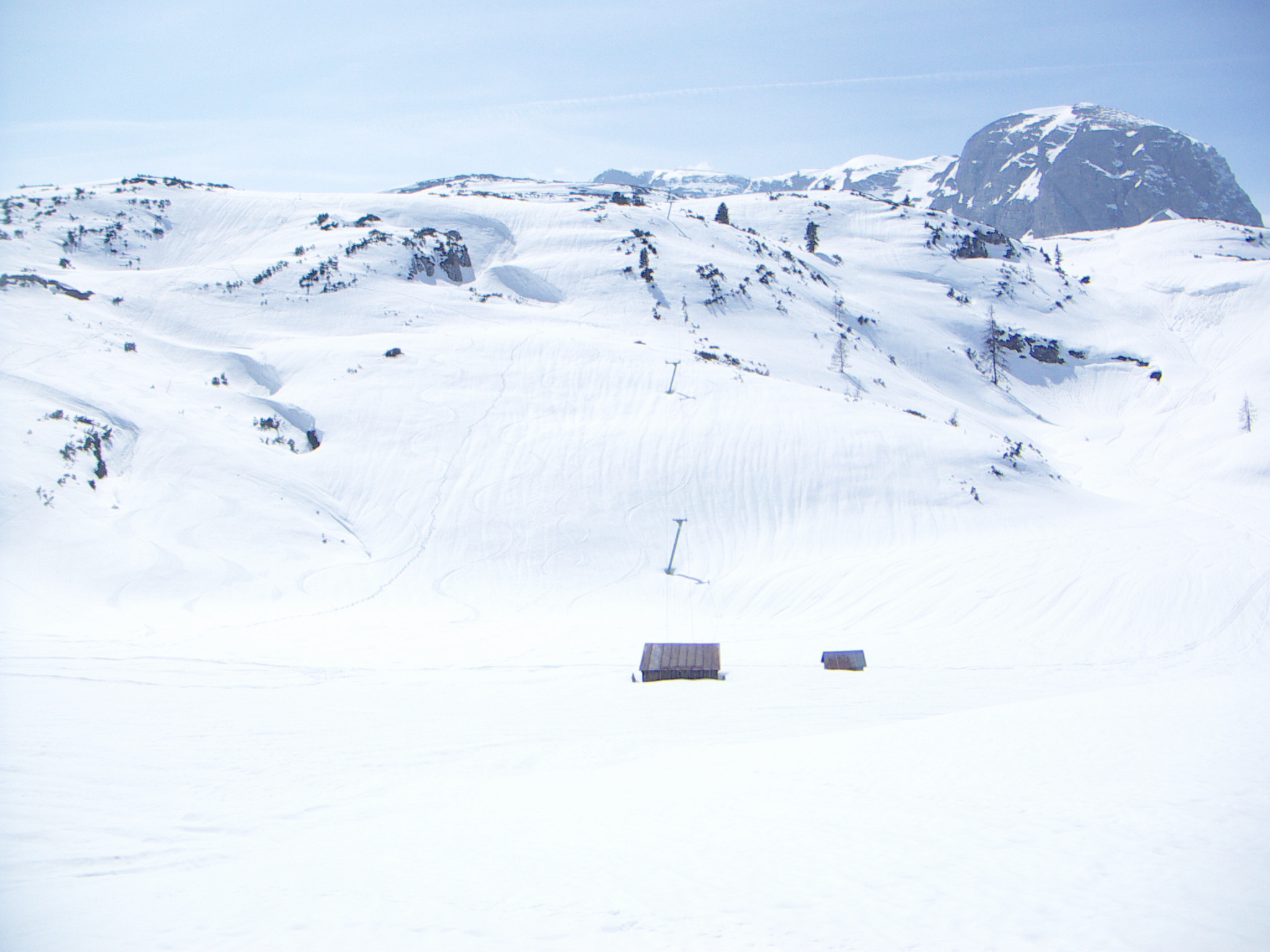 Ehemaliger Gjaidalmhauslift